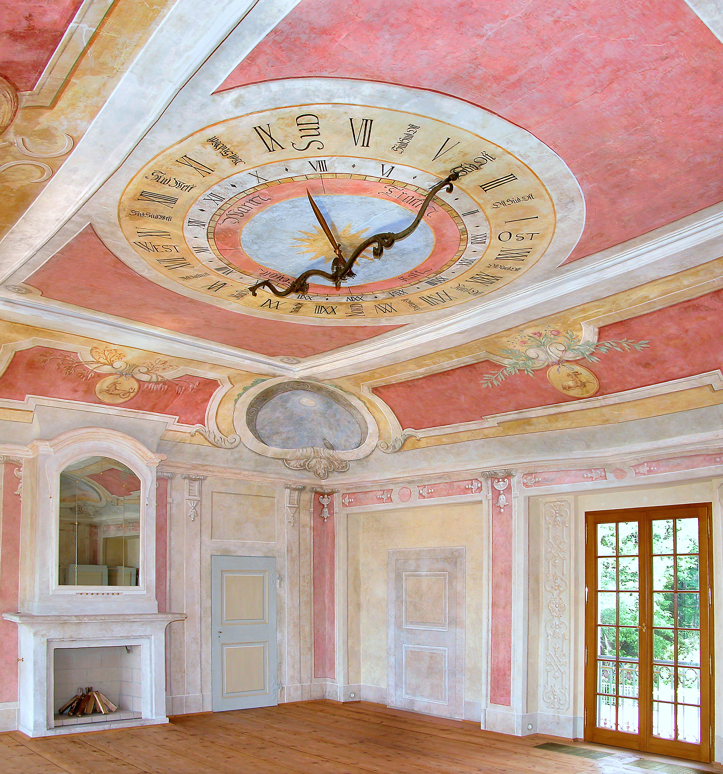 22.05.2007 01326 Dresden-Loschwitz, Schevenstraße 59 (GMP: 51.062565,13.802378). Dinglingers Weinberghaus. Johann Melchior Dinglinger (1664-1731), Goldschmied August des Starken, war seit 1692 in Dresden. Im Haus befindet sich ein barocker Saal mit der berühmten, an der Decke befindlichen Wetteruhr, deren Zeiger Windrichtung u. -stärke anzeigen. Hofmechanikus Andreas Gärtner hat sie gefertigt. Dinglinger hatte das um 1710 zur Hochzeit mit seiner fünften Frau um den barocken Flügel erweitern lassen. Eine ähnliche Wetteruhr hat Dinglinger dem russischen Zaren Peter der Große geschenkt. In den Jahren der DDR und danach bis zu seinem Tode am 08.10.2005 wohnte hier der Nestor der sächsischen Denkmalpflege, Prof. Dr. Hans Nadler. Heute gehört das Anwesen der Familie eines Notars, die es aufwendig saniert hat. Nicht öffentlich zugänglich. [DSCN28133+28135.TIF]20070522041MDR.JPG(c)Blobelt